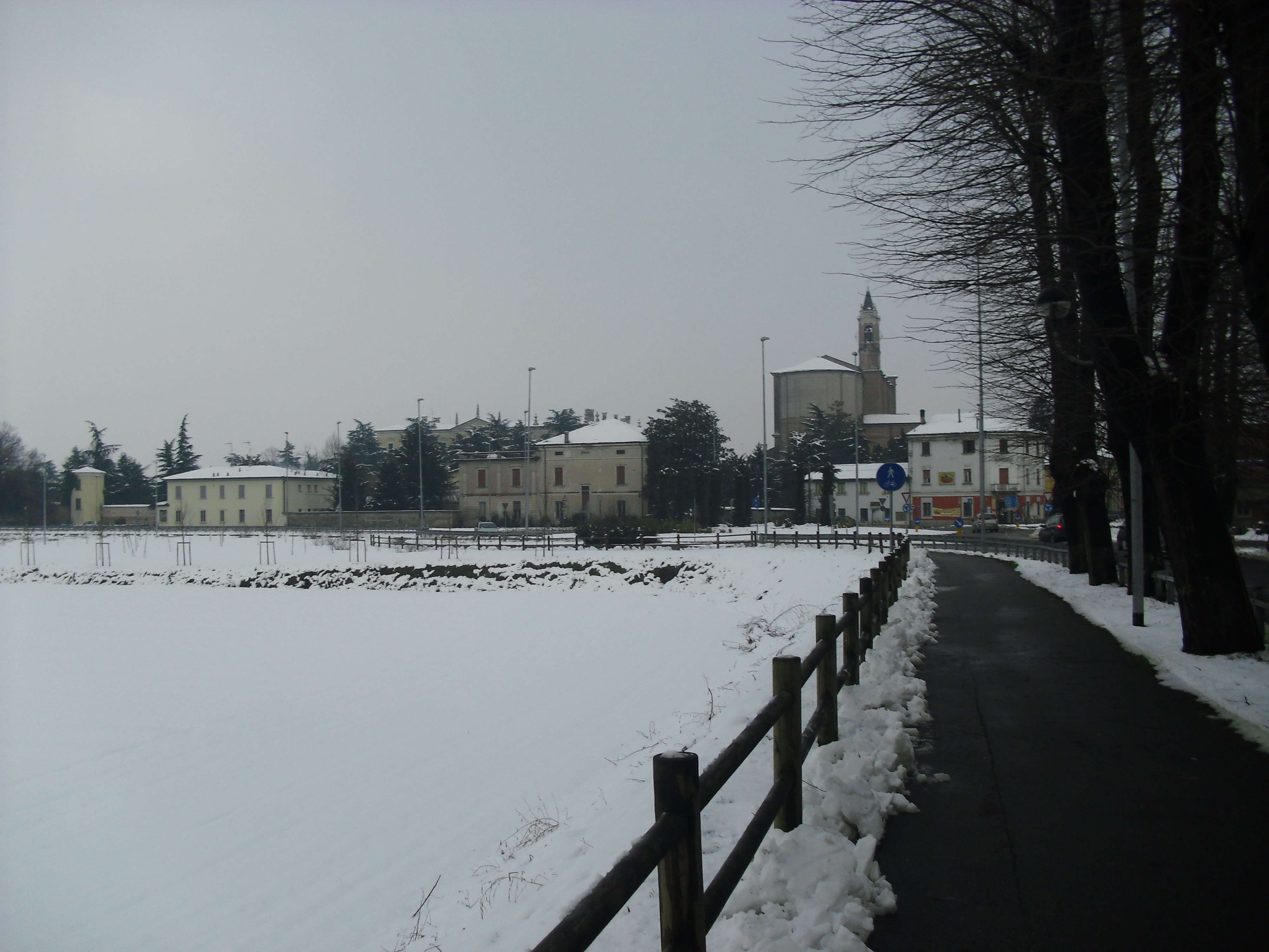 Nevicata invernale febbraio 2013.